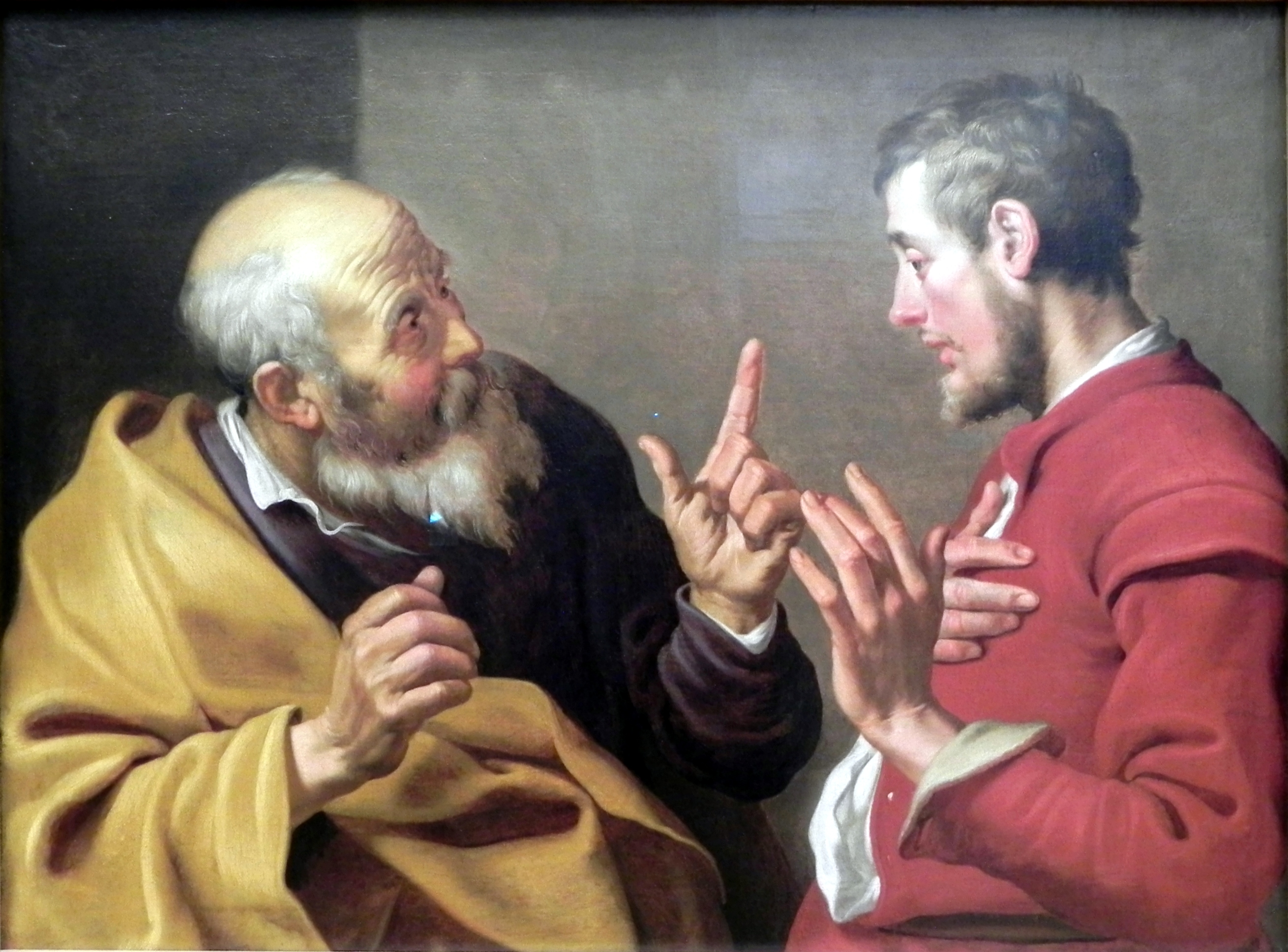 Es stellt die Szene aus dem Alten Testament von dem Propheten Elisa und seinem Knecht Gehasi (2. Könige, 5, 25-26) dar. In der Geschichte hatte der Prophet Elisa den aramäischen Feldhauptmann Naëman vom Aussatz geheilt. Dessen Dankesgaben lehnte er ab, sein Diener erschwindelt sich aber die Geschenke.